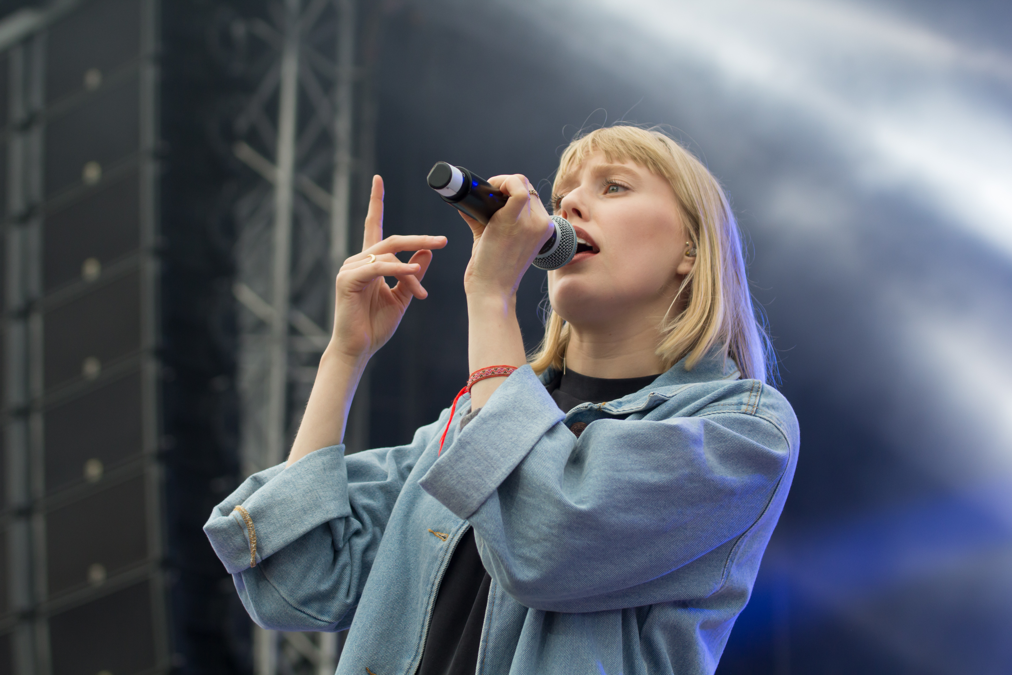 Auf der Kieler Woche 2018